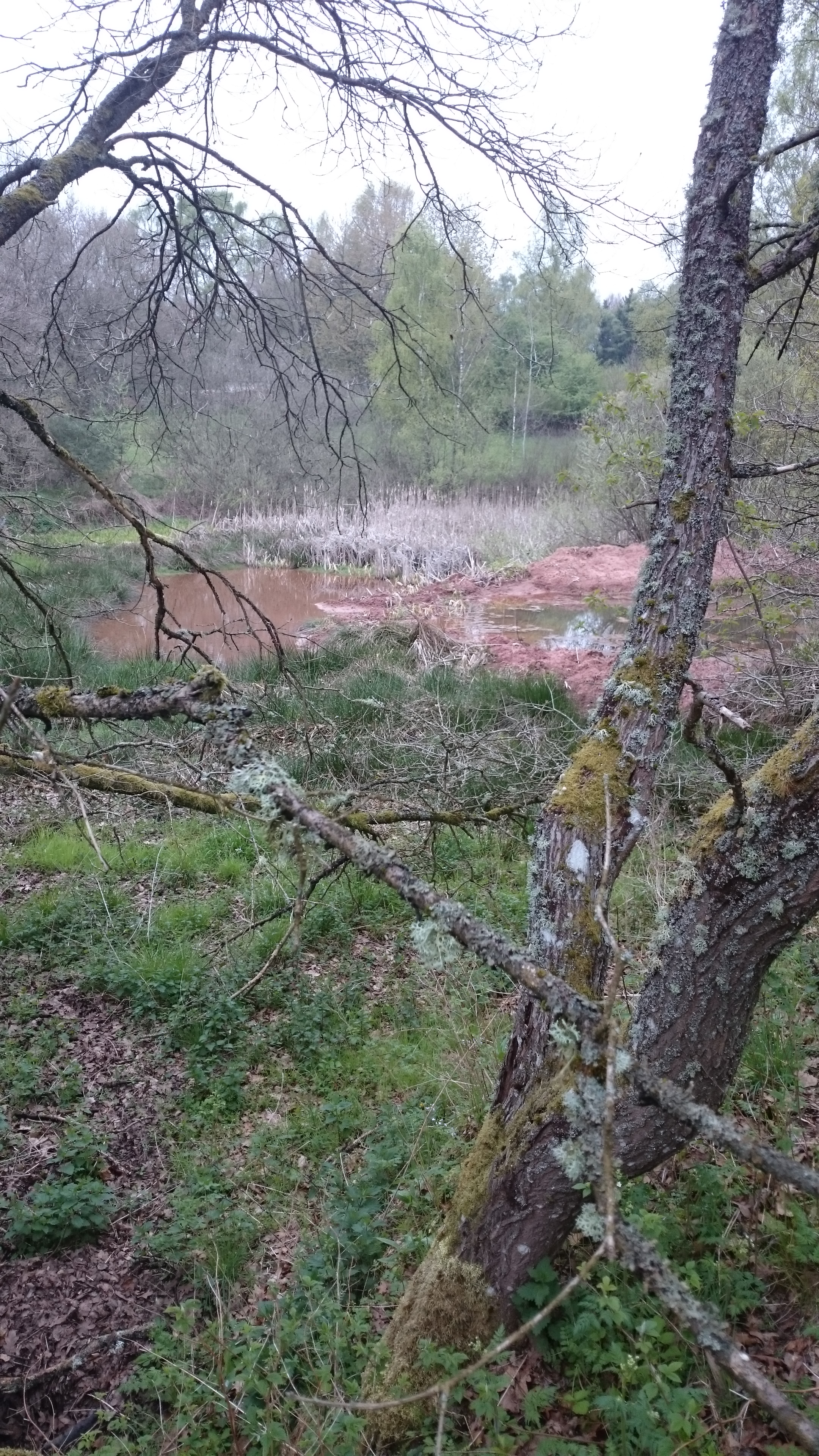 Eine der Tongruben im Naturschutzgebiet Birkenfelder Tongrube. 55765 Birkenfeld /Nahe